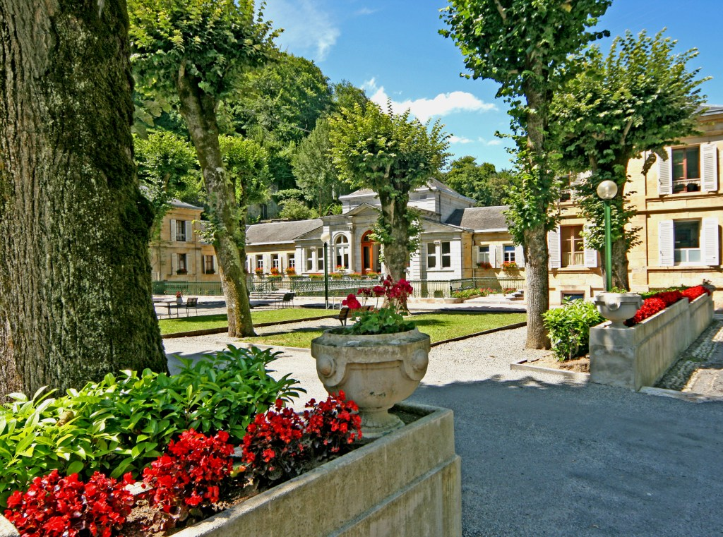 les Thermes